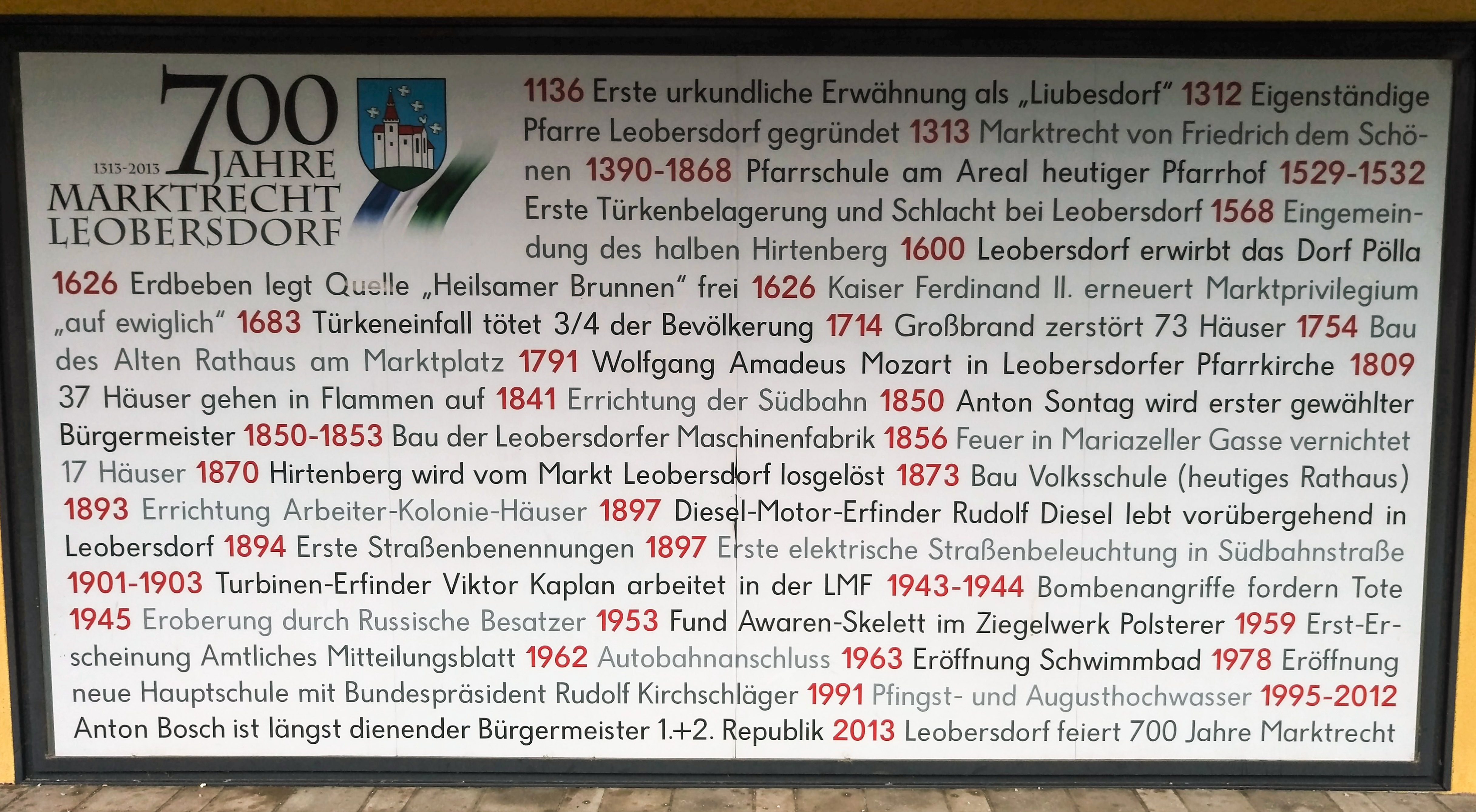 2013 zur 700-Jahr-Feier im Ortskern angebrachte Tafel mit den wichtigen Ereignissen der letzten 700 Jahre.